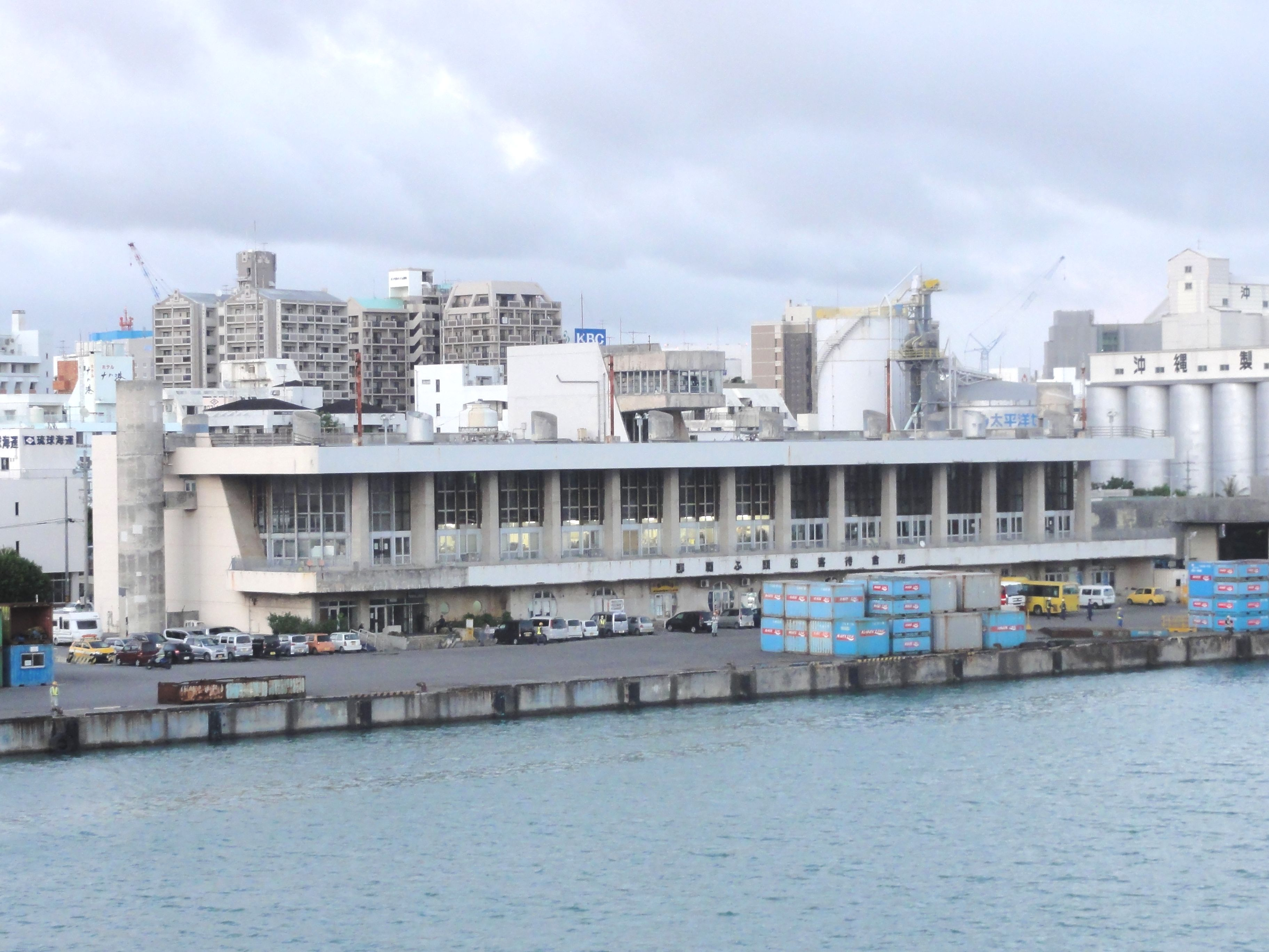 那覇ふ頭船客待合所